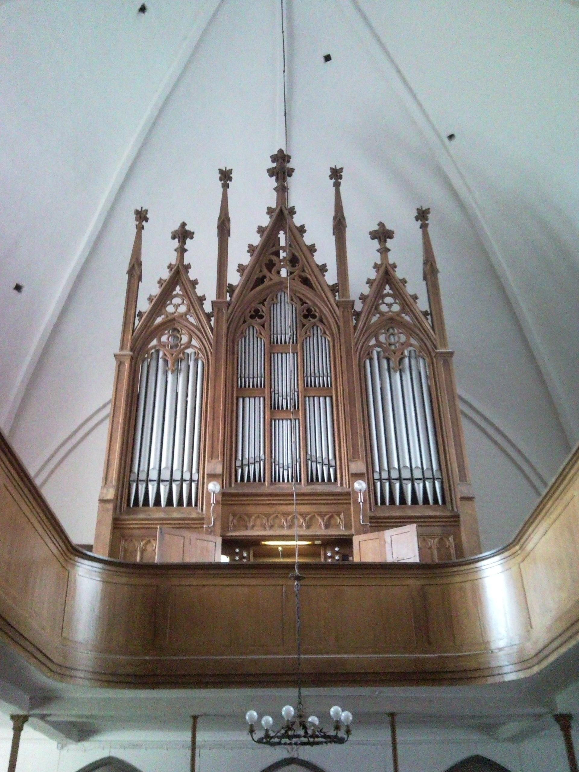 Prospekt der Winzer-Orgel St.Peter und Paul Schwaan